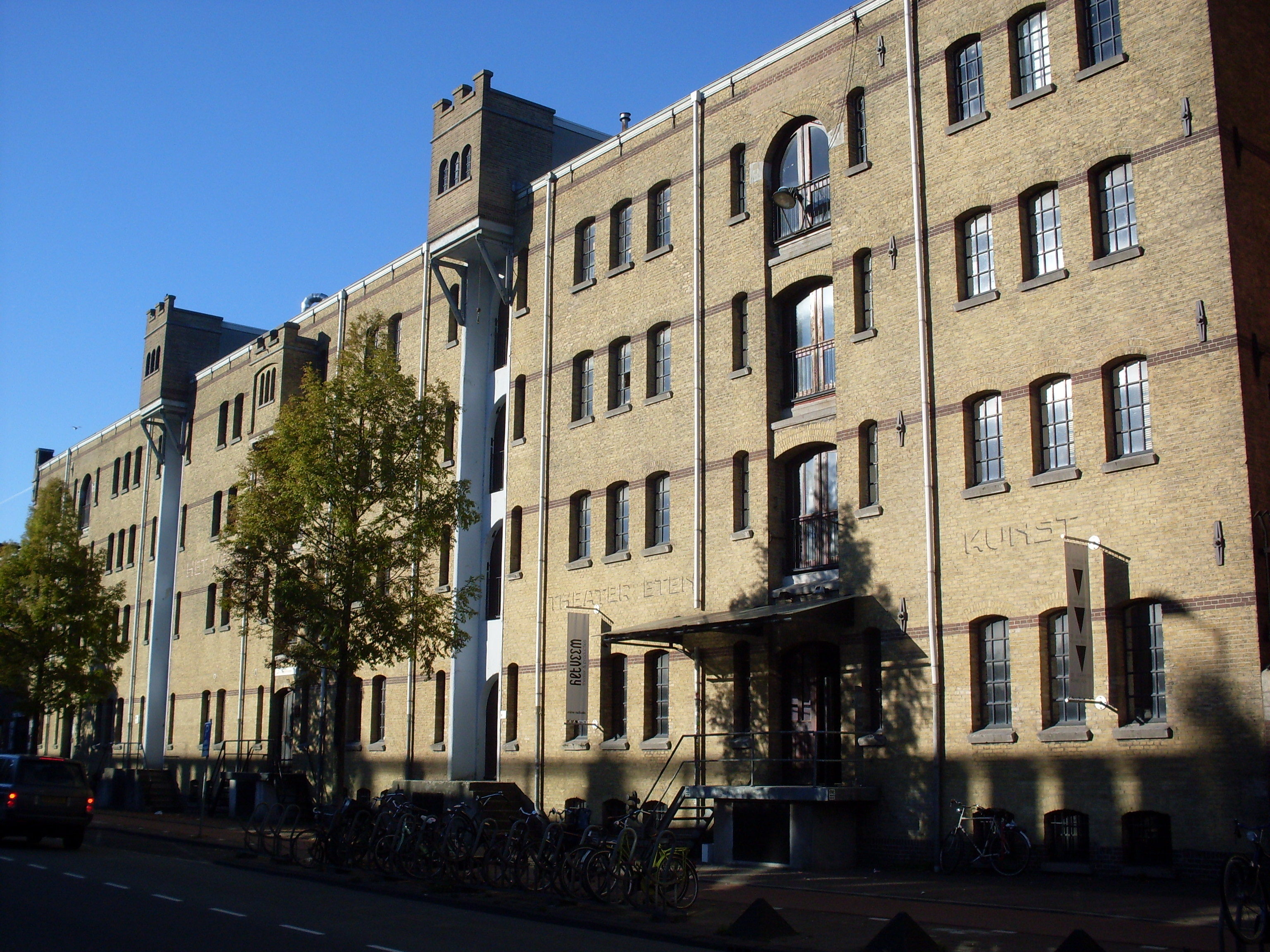 Het Veem v. Diemenstraat 406 Amsterdam.